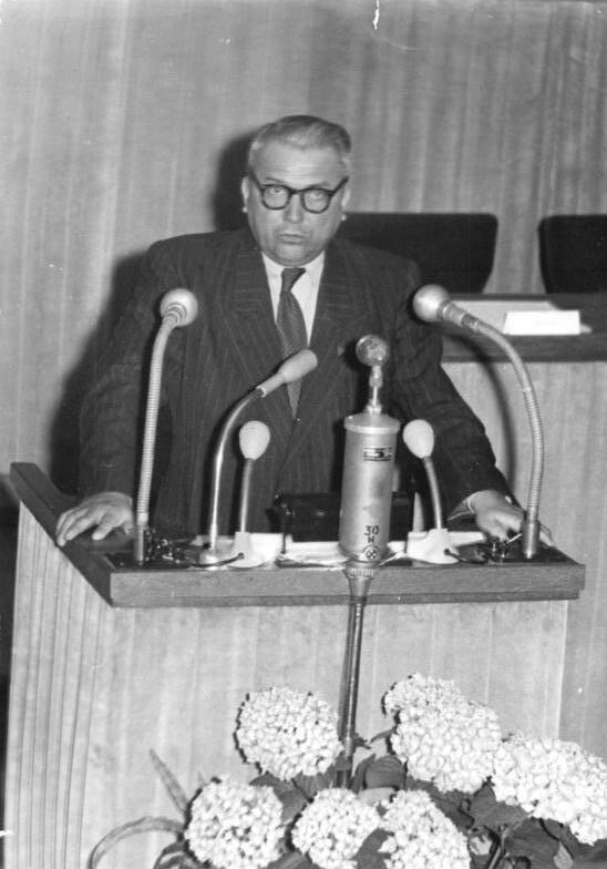 Illus-Sturm 9.5.1951- Volkskammer beschließt Volksbefragung. Am 9. Mai 1951, fand in Berlin eine Sitzung der Volkskammer statt, auf der der Stellvertretende Ministerpräsident Walter Ulbricht über die Volksbefragung in der DDR sprach. UBz: Diskussion zum Referat Walter Ulbrichts. Kühn, (FDGB) bei seiner Diskussionsrede.